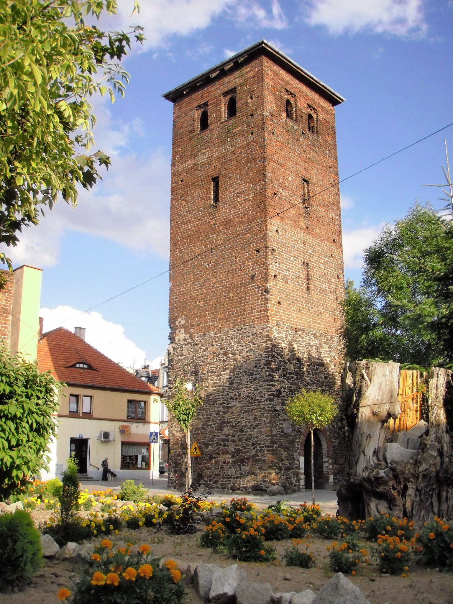 Byczyna, Brama Niemiecka, XV-XVI